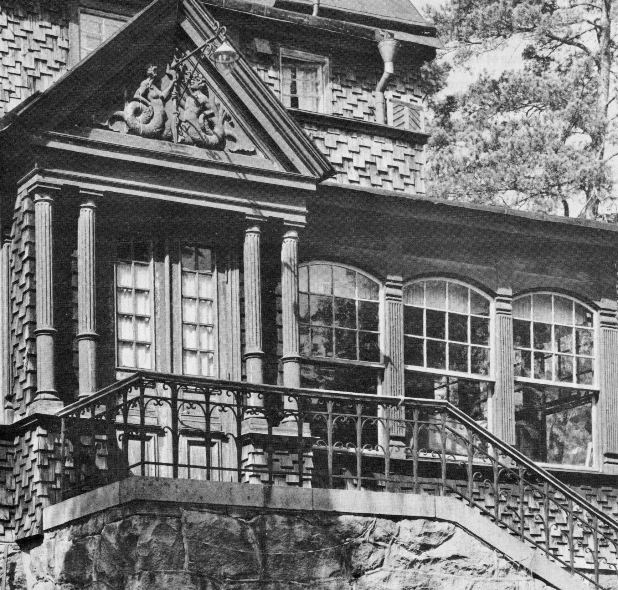 Veranda för Bogemanska villan vid Ringvägen 74 i Saltsjöbaden (finns ej kvar längre).